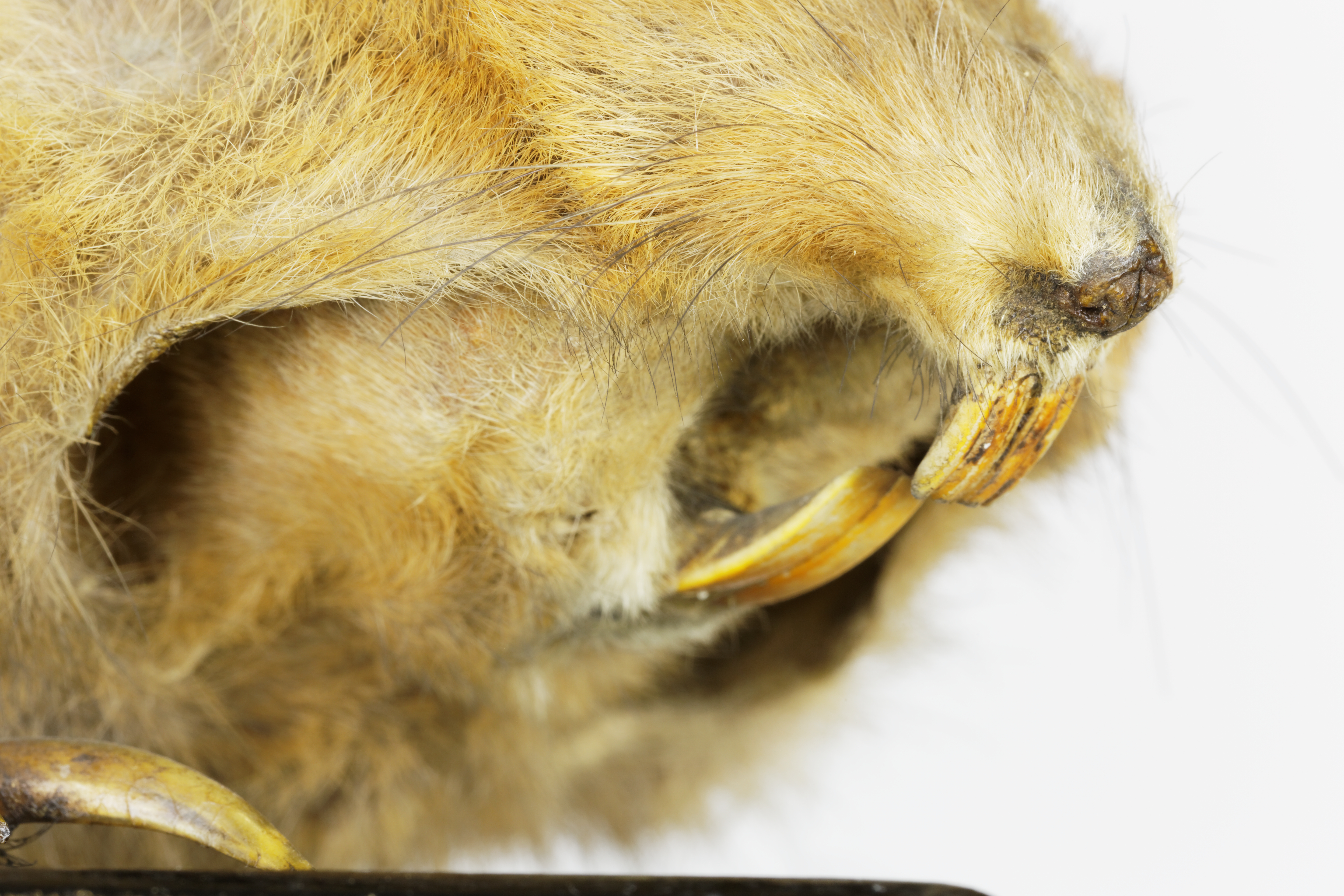 Incisives d'un rat à abajoues Nom vernaculaire Rat à abajoues ou gaufre brun Nom latin Geomys bursarius Nature du spécimen animal à la peau naturalisée Place dans le règne animal Chordé, Mammifère, Rongeur. Provenance Collection de Zoologie de l'Université Pierre et Marie Curie (UPMC) à Paris Dimensions du socle (cm) 24,8 (L) x 10,3 (l) x 1,6 (h) (bois) Longueur approximative du spécimen (cm) 25 (sans la queue)(donnée non biométrique). Hauteur total du spécimen (cm) 8.8 (donnée non biométrique)